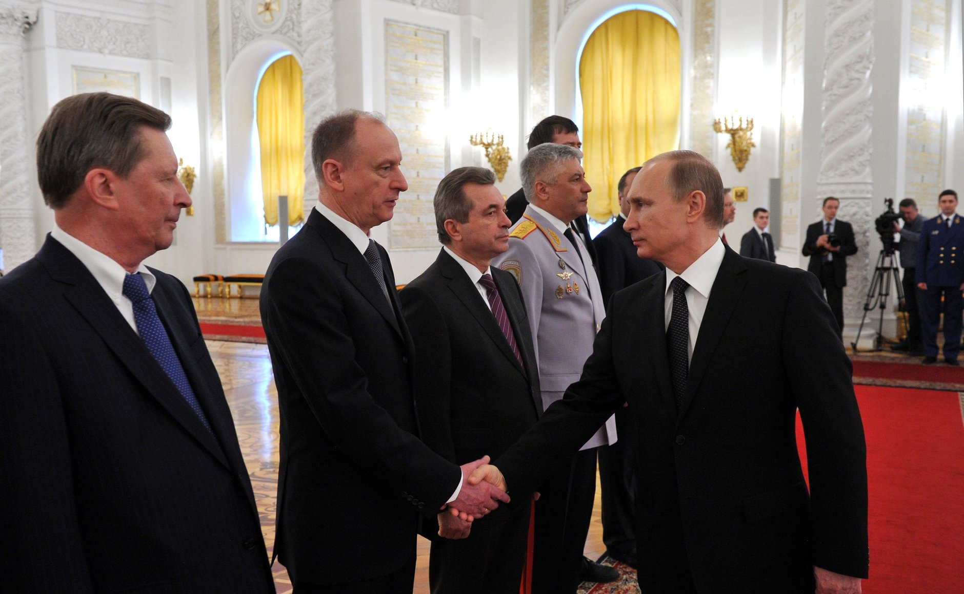 Слева направо: Руководитель Администрации Президента Сергей Иванов, Секретарь Совета Безопасности Николай Патрушев, помощник Президента Евгений Школов, Министр внутренних дел Владимир Колокольцев